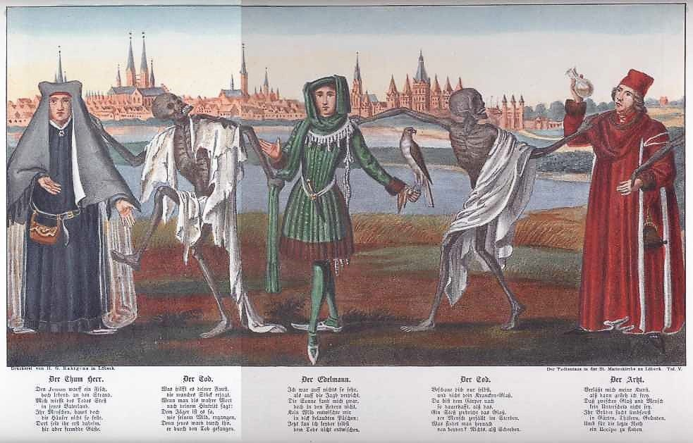 Carl Julius Milde dokumentierte zeichnerisch 1852 den Lübecker Totentanz von Bernt Notke in der Lübecker Marienkirche. Diese Zeichnungen gingen als Lithographien 1862 in den Handel. Der Text stammte von Nathanael Schlott (1701).